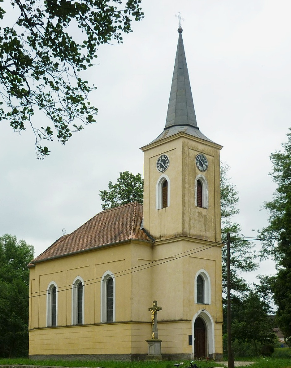 Jindřiš